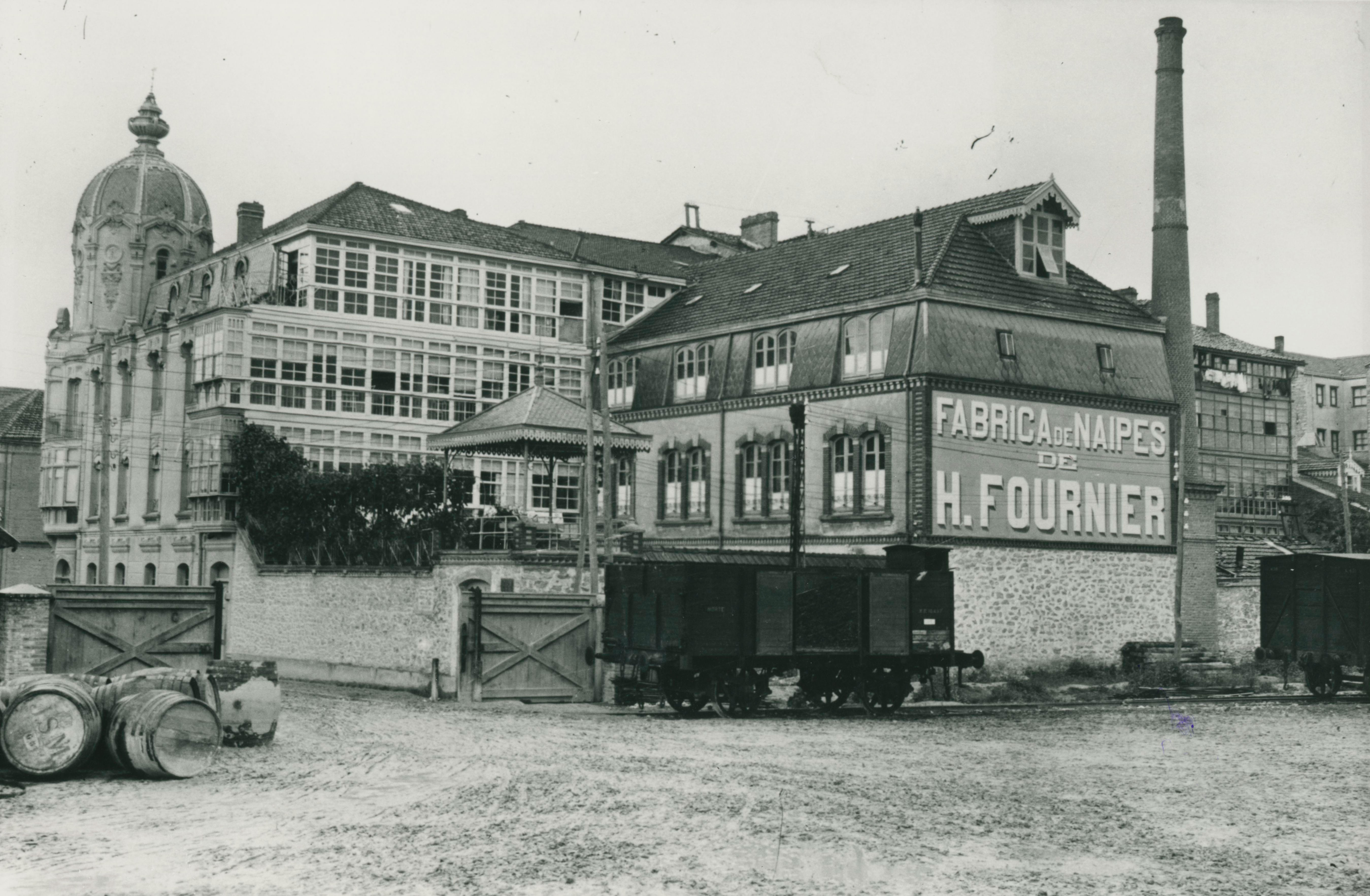 Arabako Fournier Karta Museoa Museo Fournier de Naipes de Álava